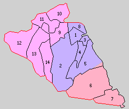 佐賀県藤津郡の町村制時点の町村。